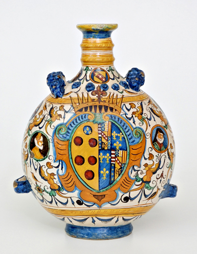 Fiasca di Montelupo decorata a raffaellesche. Seconda metà del XVI secolo. Stemma Medici-Lorena